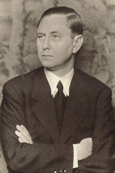 Scan (22.11.2019)